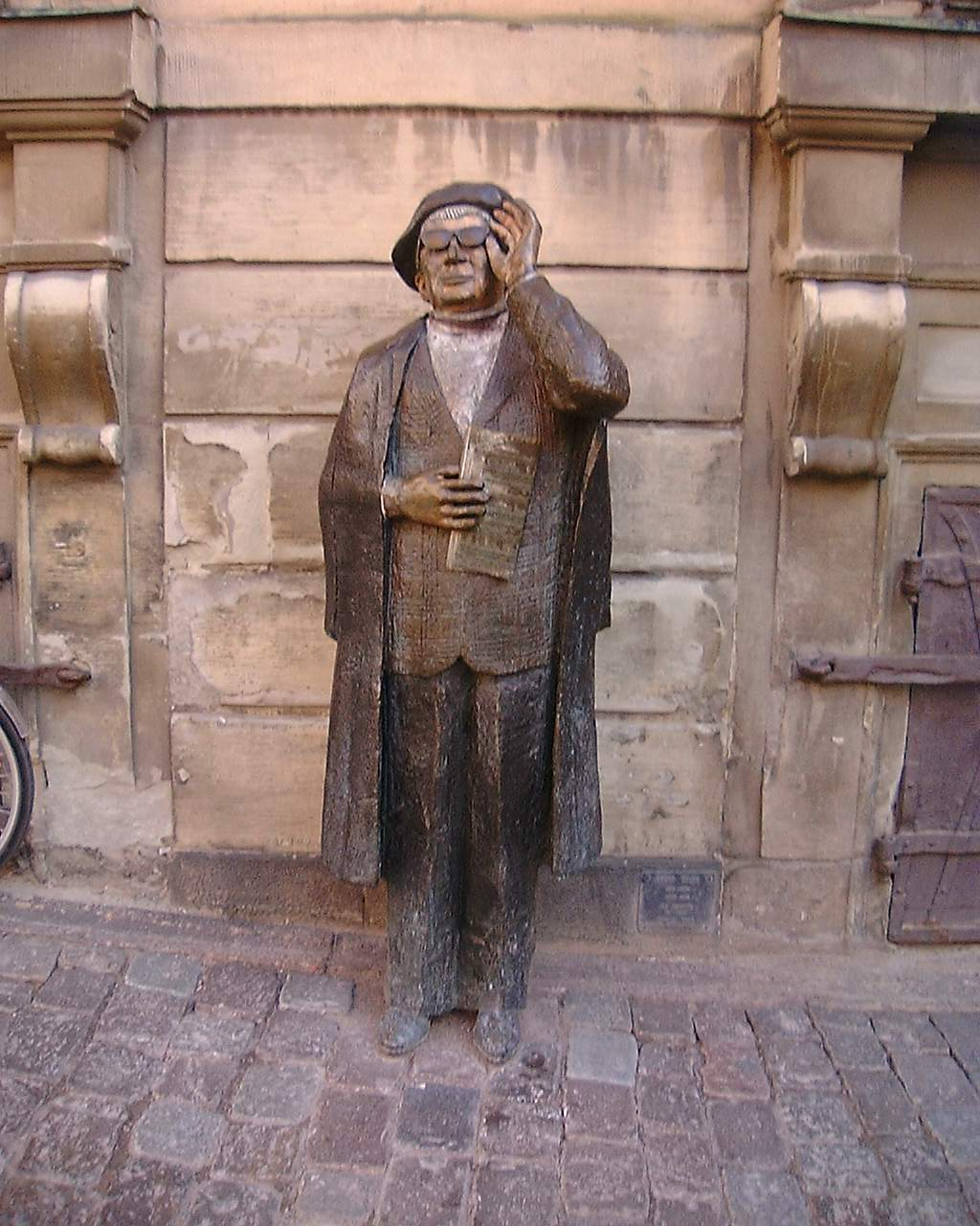 Statue of Evert Taube at Järntorget, Gamla stan, Stockholm.